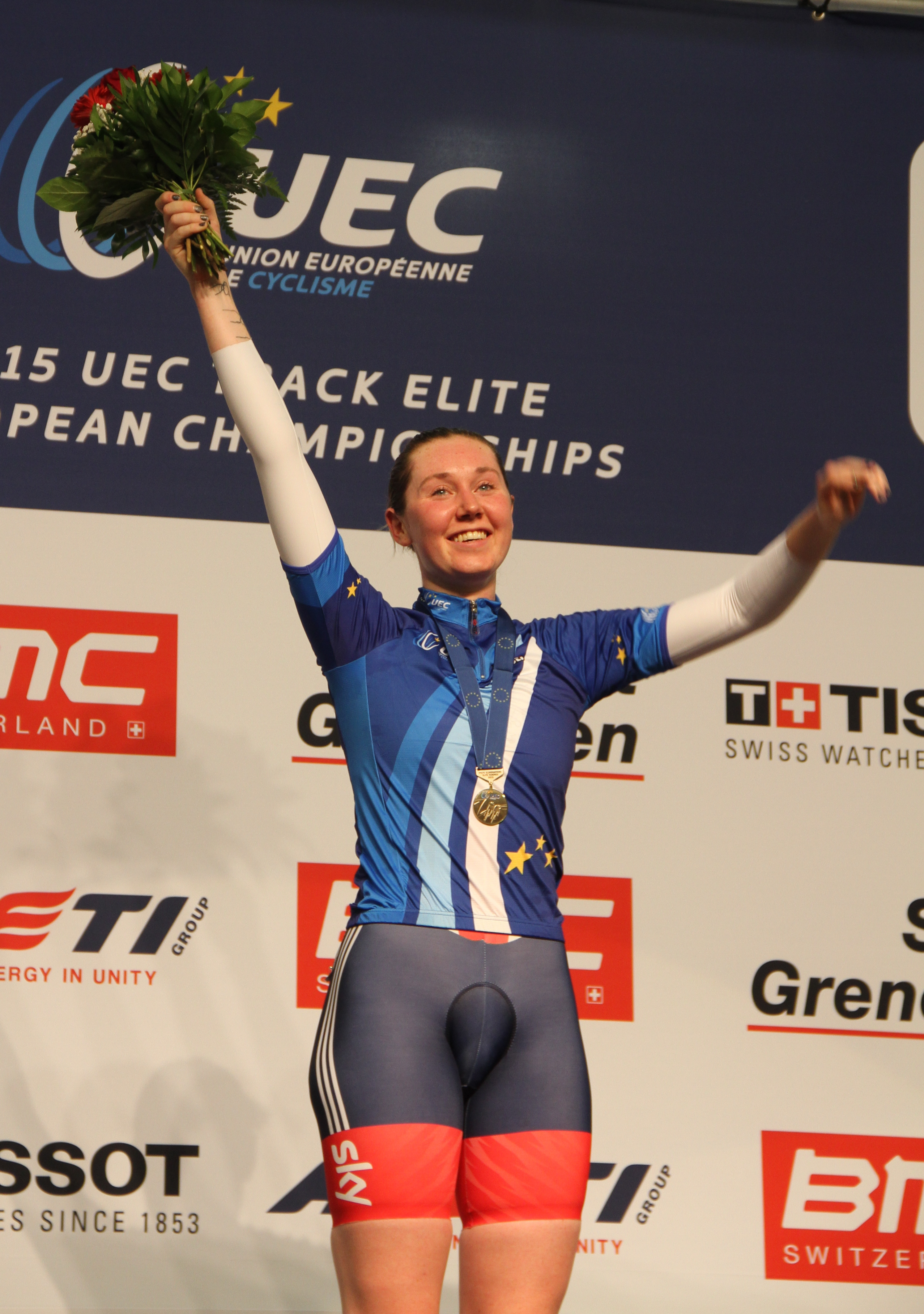 Katie Archibald, brit. Radsportlerin, Europameisterin im Ausscheidungsfahren The making of this document was supported by the Community-Budget of Wikimedia Germany.